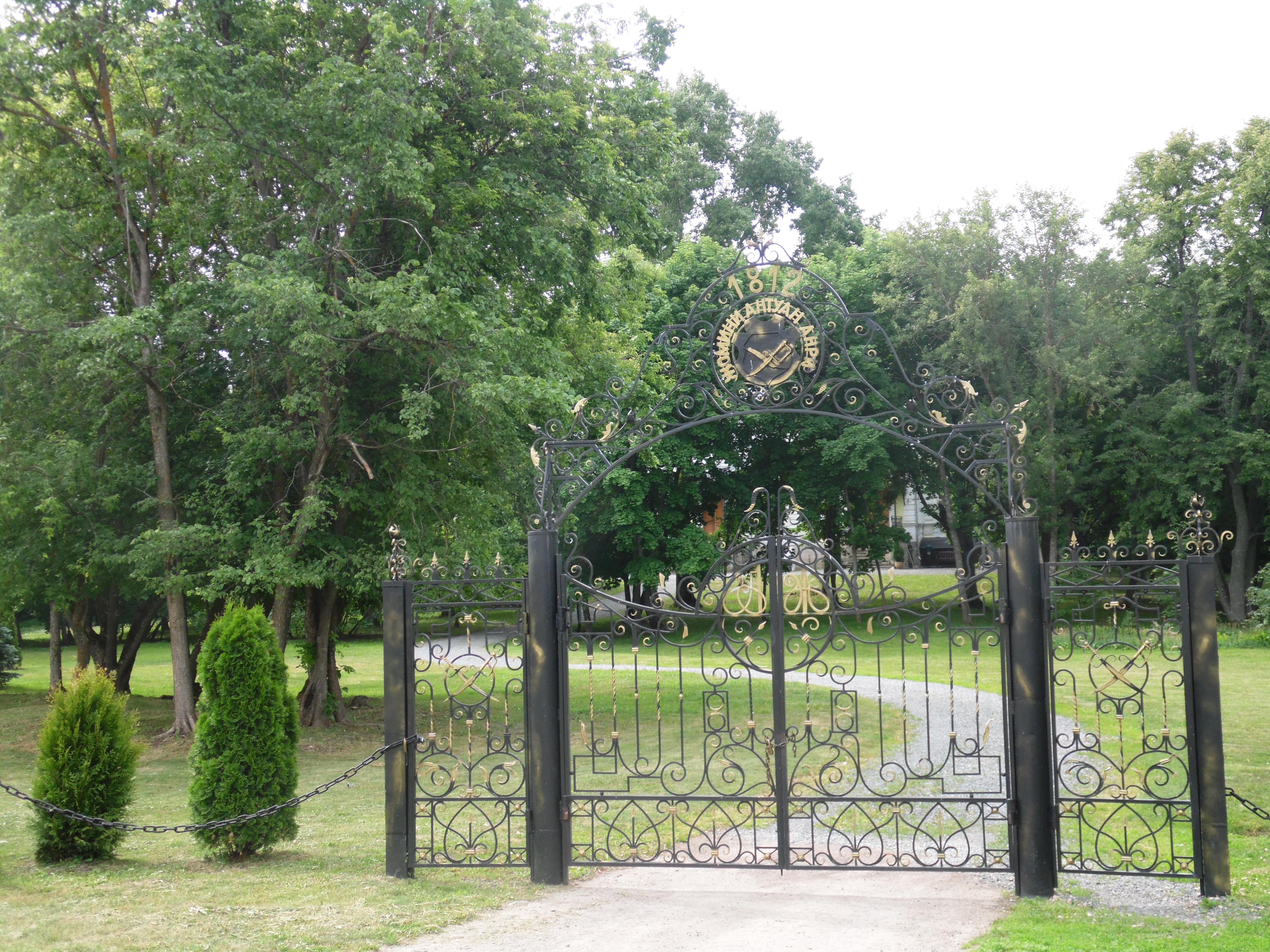 Парк п. Баронский: Гагинский район, Нижегородская область This image is related to the protected area of Russia number 5210224